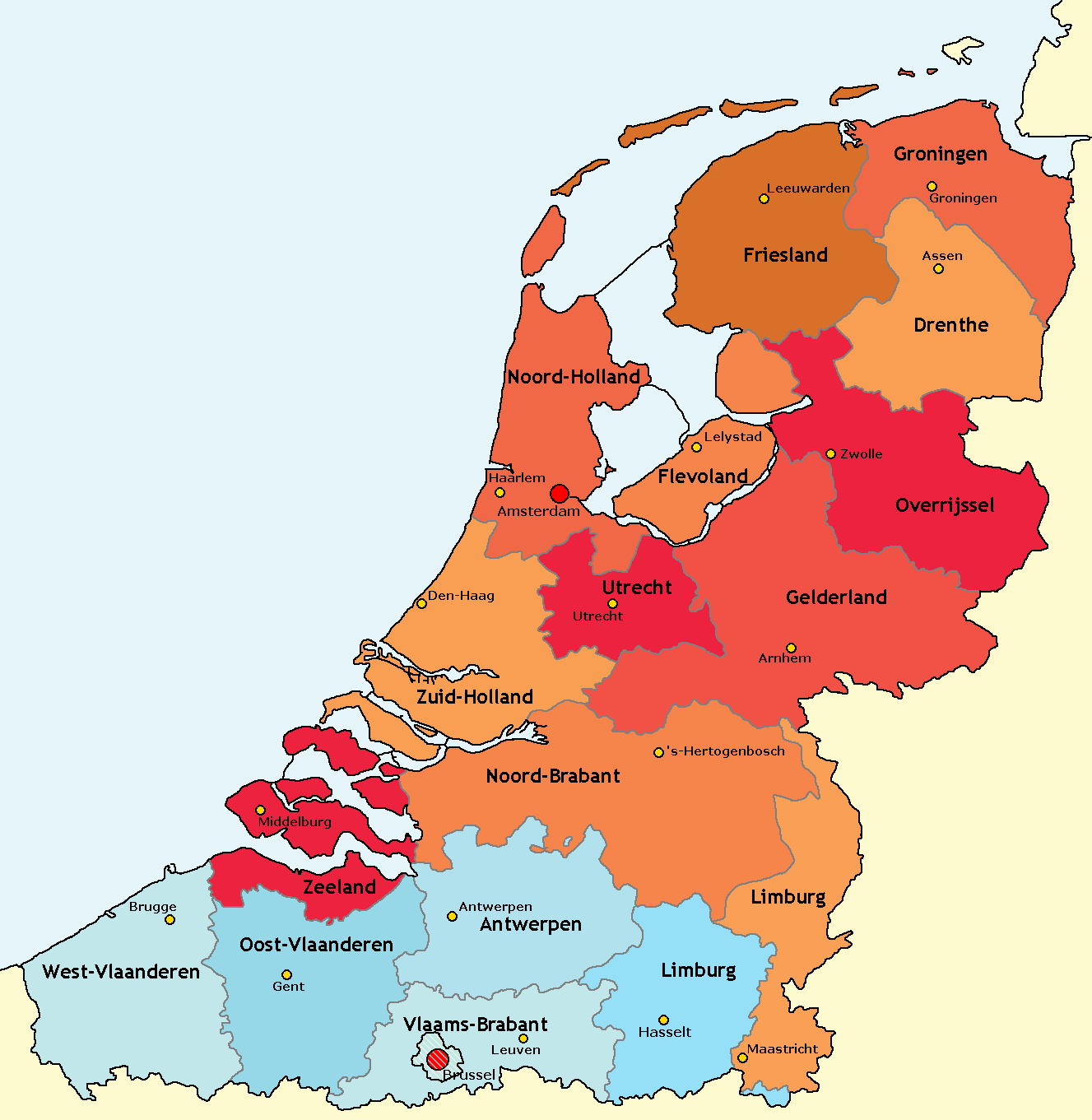 Groot-Nederland en haar provincies.